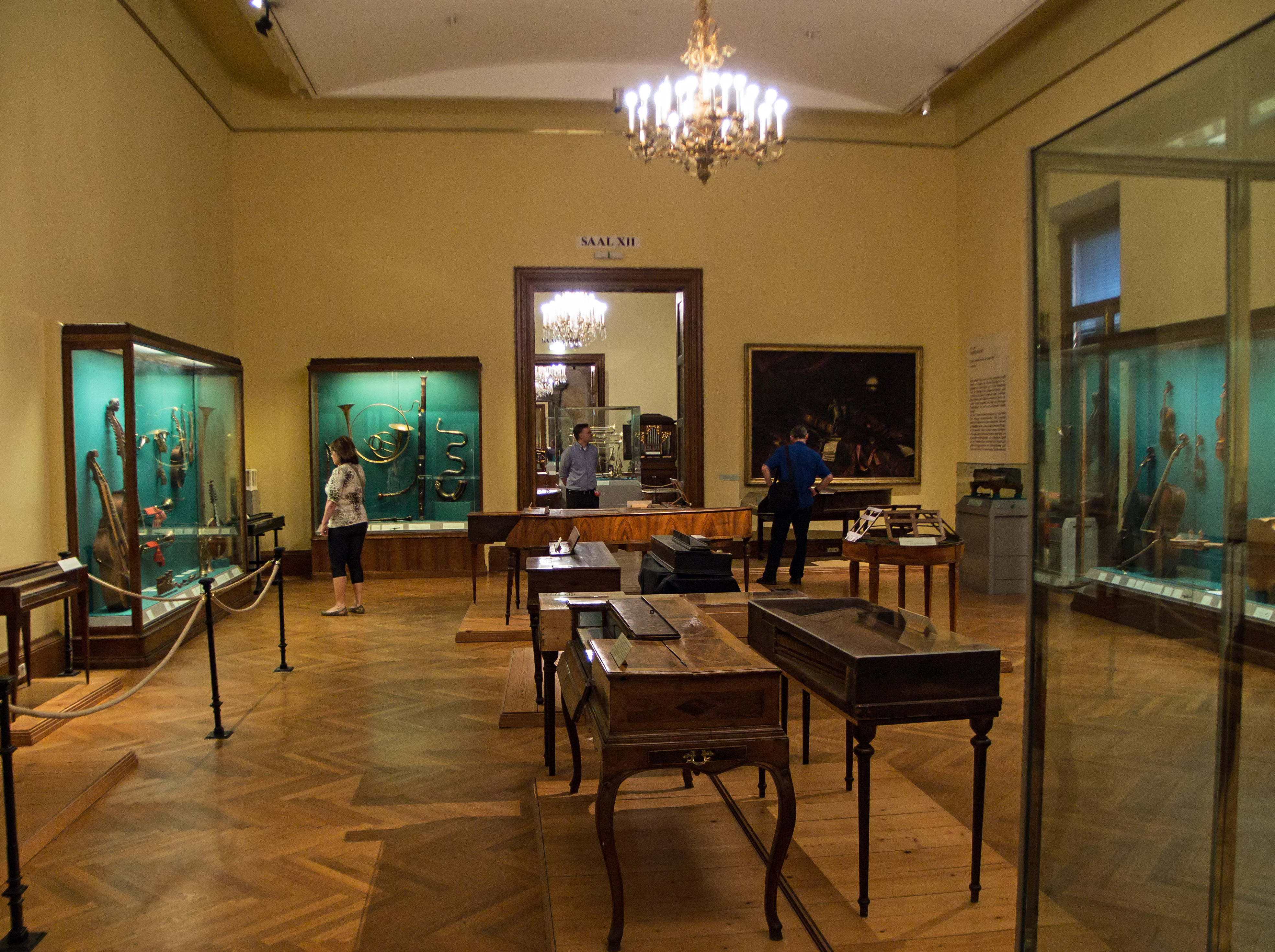 Bli Hofburg (Neue Burg), die das Haus der Geschichte Österreich (HGÖ) beherbergen wird: Schauräume vor der musealen Adaptierung.